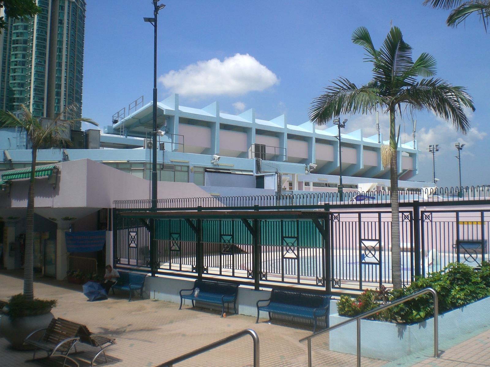 紅磡環海街大環山游泳池